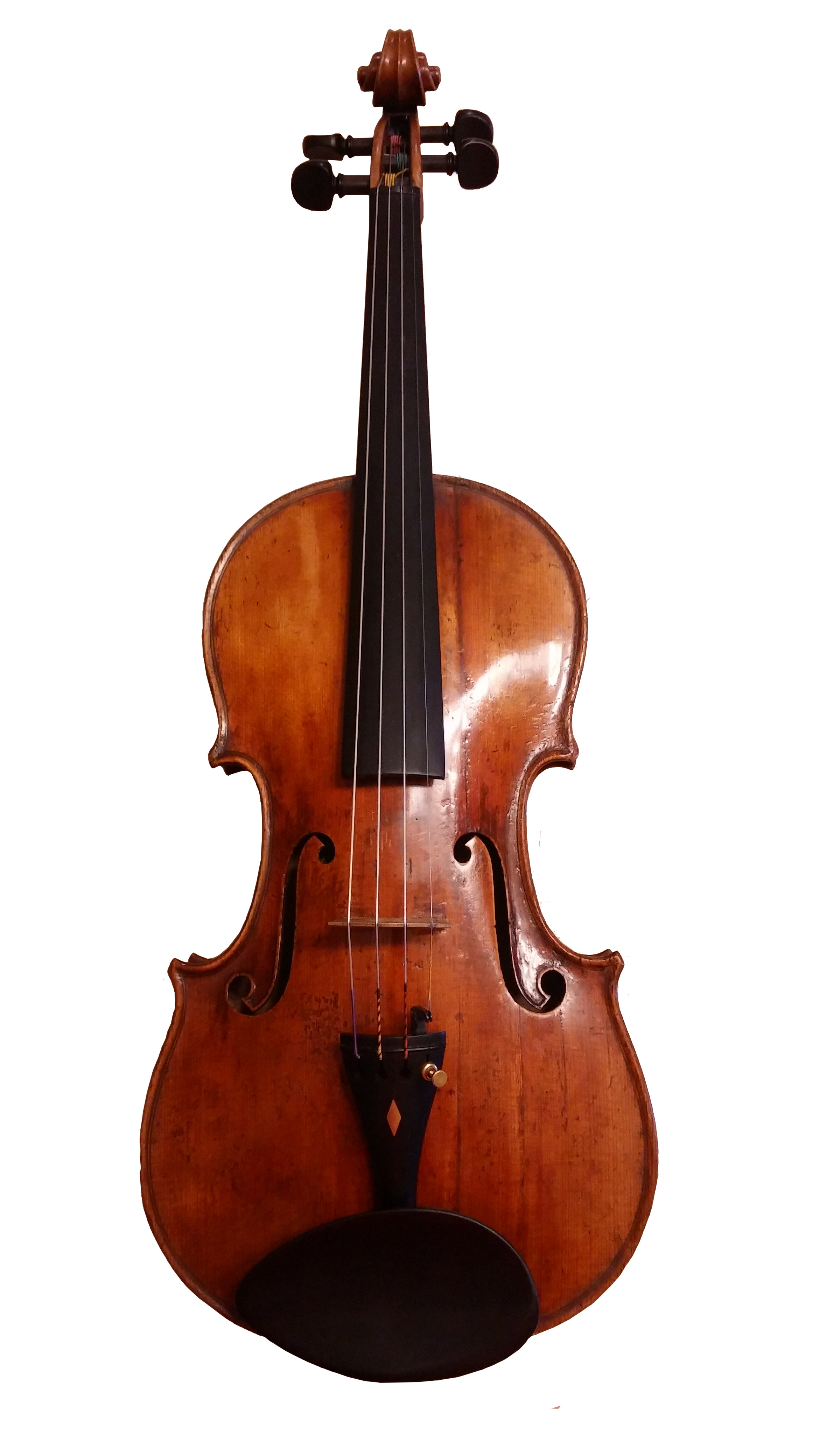 Violine von Mathias Heinicke gefertigt im Jahre 1921